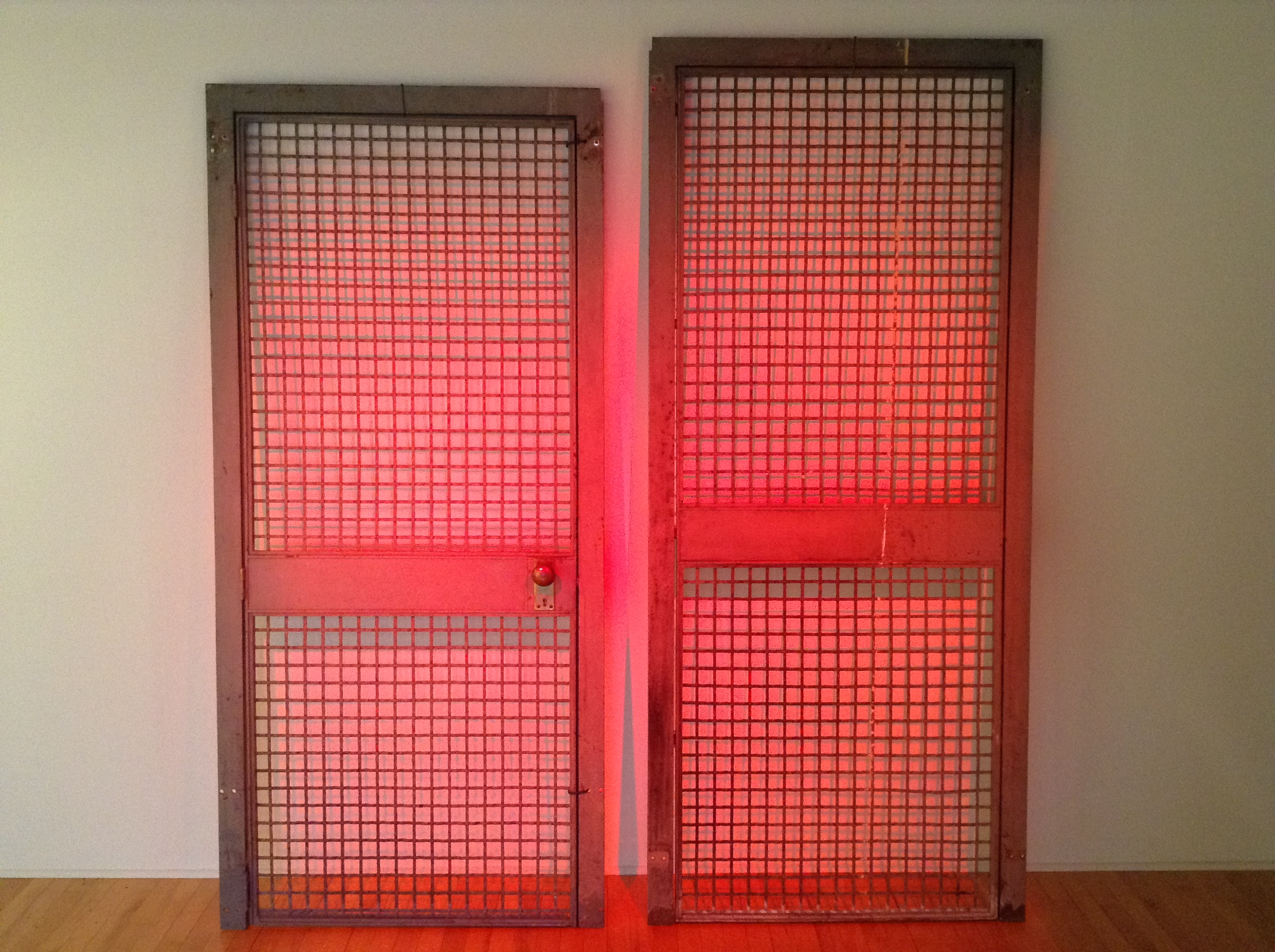 Portes grillagées de l'Enfer de la Bibliothèque de la Ville de Montréal, qui ont protégé jusqu'en 1966 l'accès aux livres mis à l'Index. Date de construction : entre 1914 et 1917.